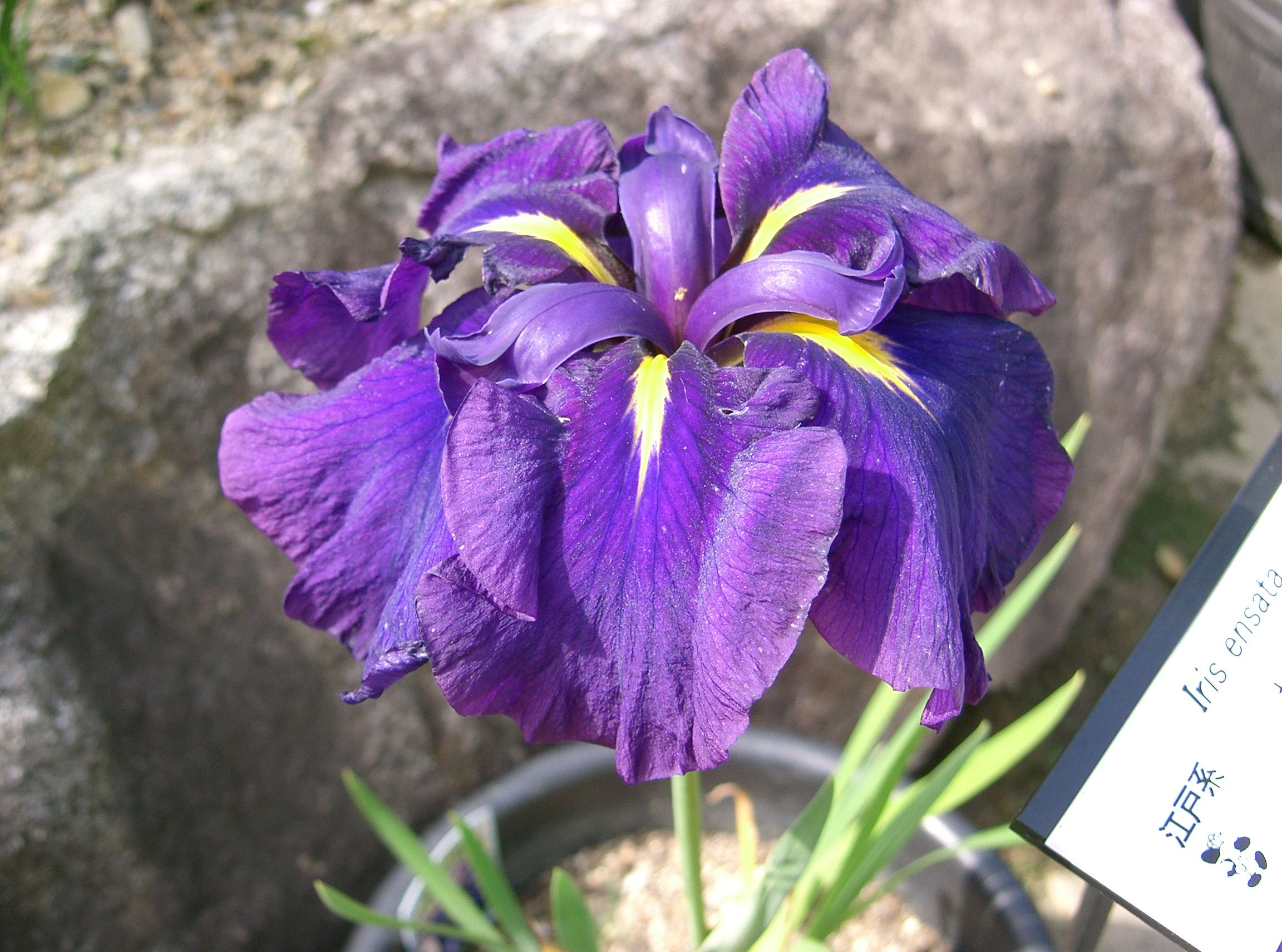 Iris ensata var. ensata 'Hatsu-Garasu'